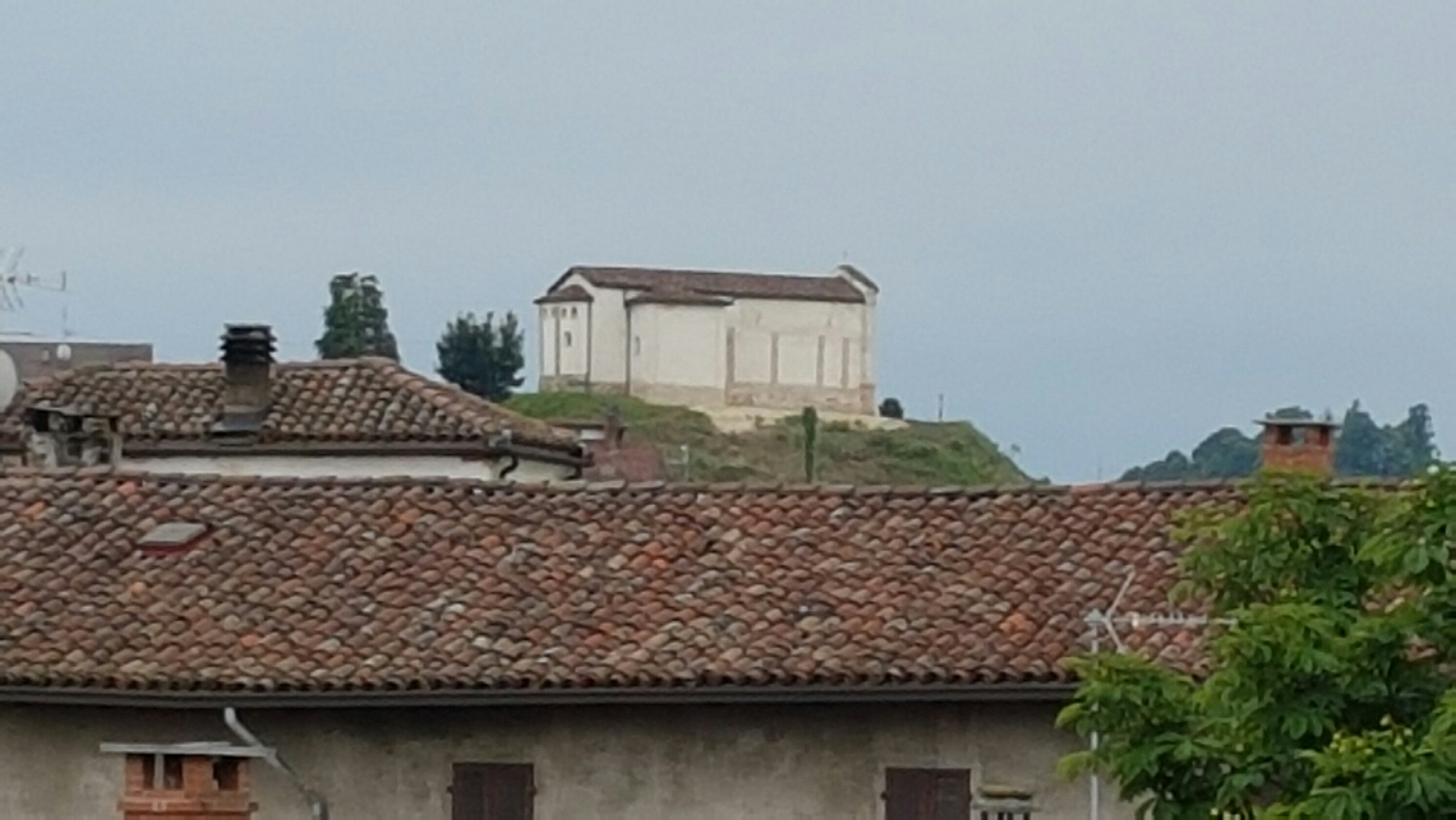 Piccolo gioiello romanico risalente al secolo XI, sorge all’estremità sud del paese di Rocca d’Arazzo (AT)